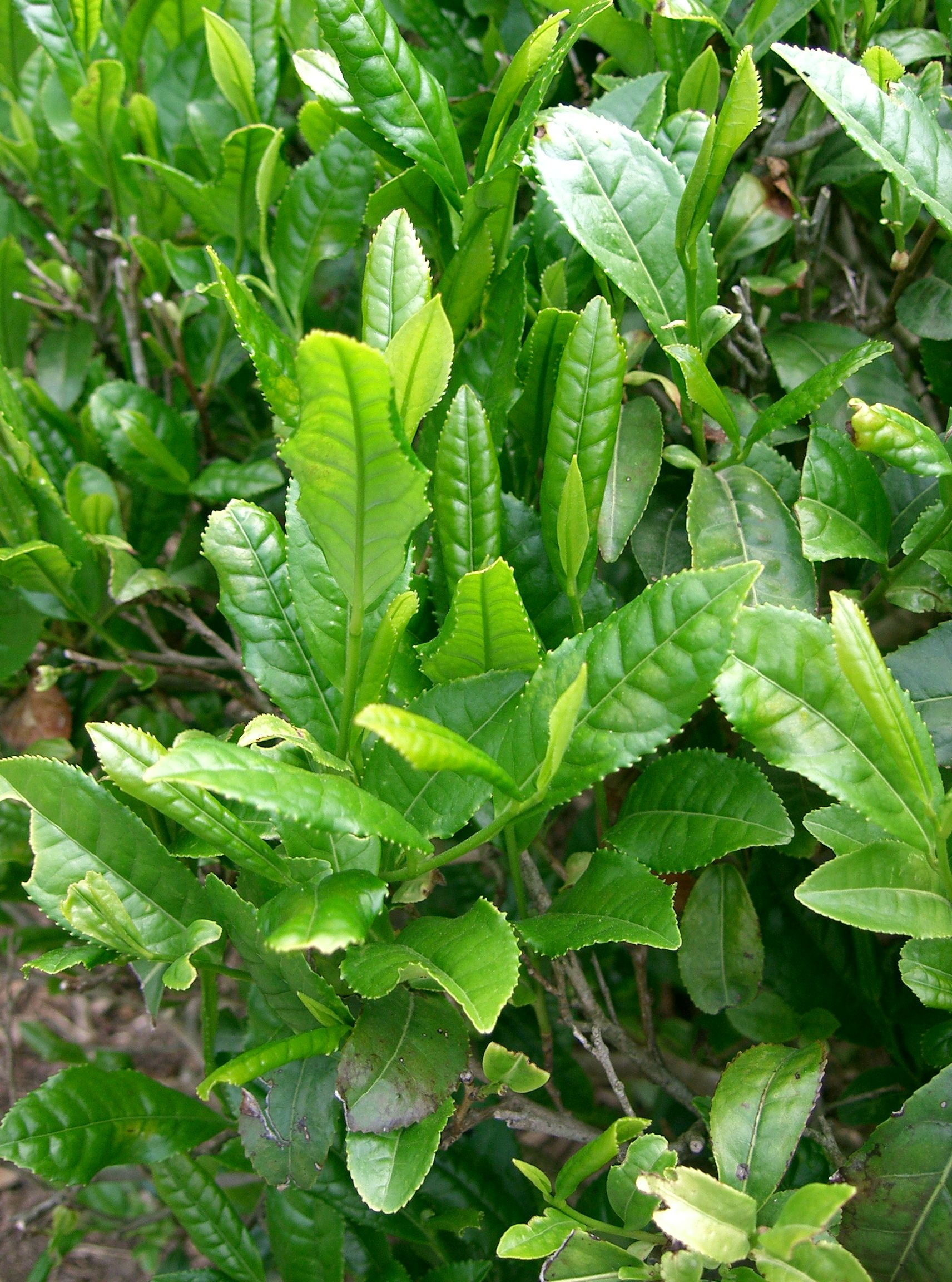 Camellia sinensis